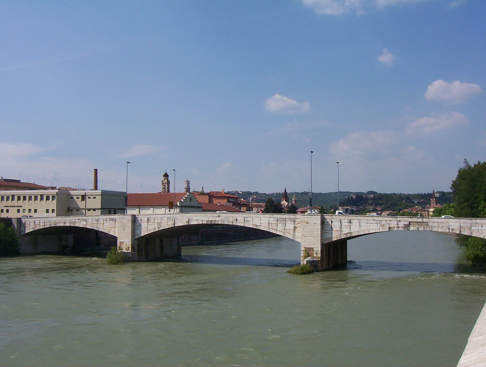 Ponte Aleardi a Verona